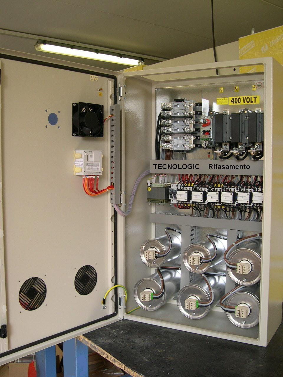 Esempio di quadro di rifasamento